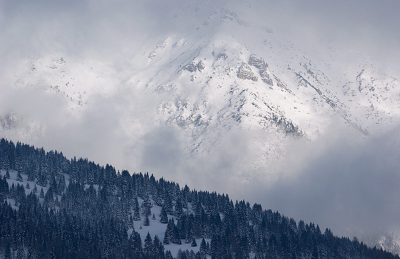 La cima Portule vista da ovest